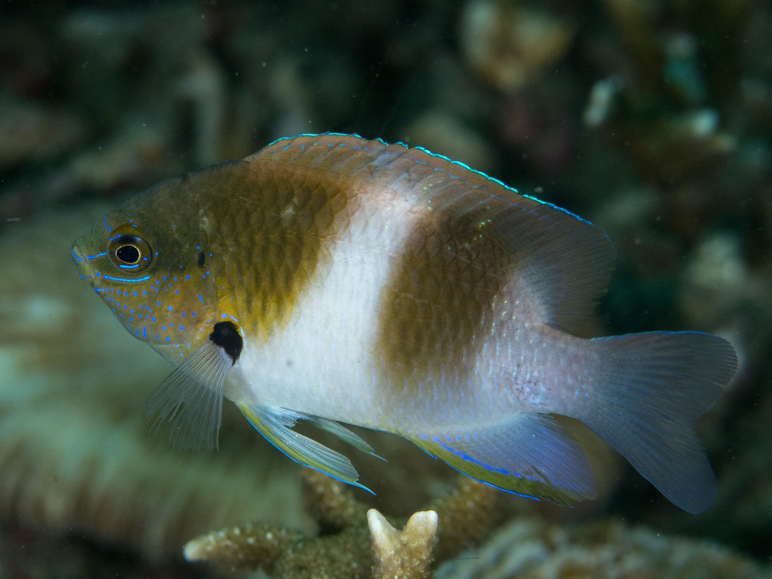 Lembeh, Indonesia - Honeyhead damsel old juvenile (Dischistodus prosopotaenia)